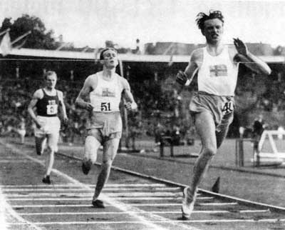 Arne Andersson landslagsdebuterar i Finnkampen den 28 juli 1939 och vinner 1500 meter på nytt svenskt rekord, 3,48.8.